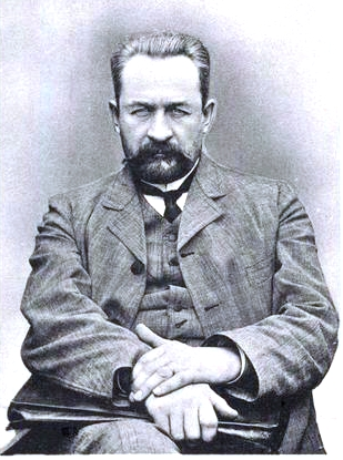 Львов, Георгий Евгеньевич